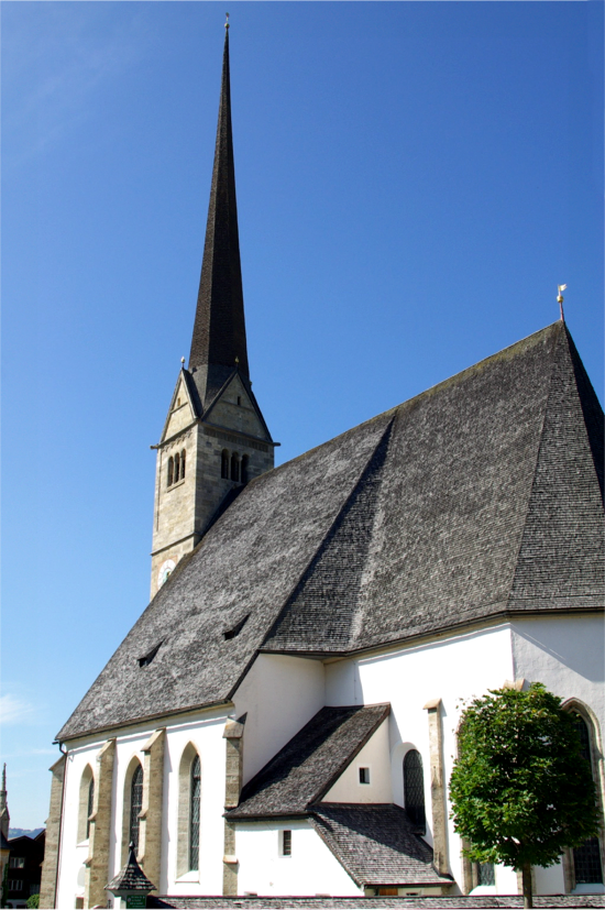 Kath. Pfarrkirche hl. Maria und Friedhof